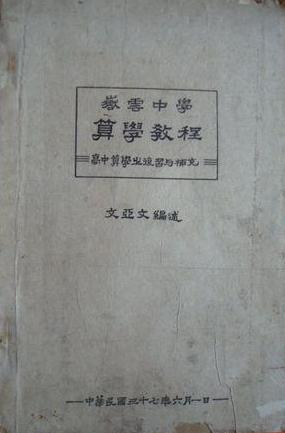 文亞文先生編述的算學課程